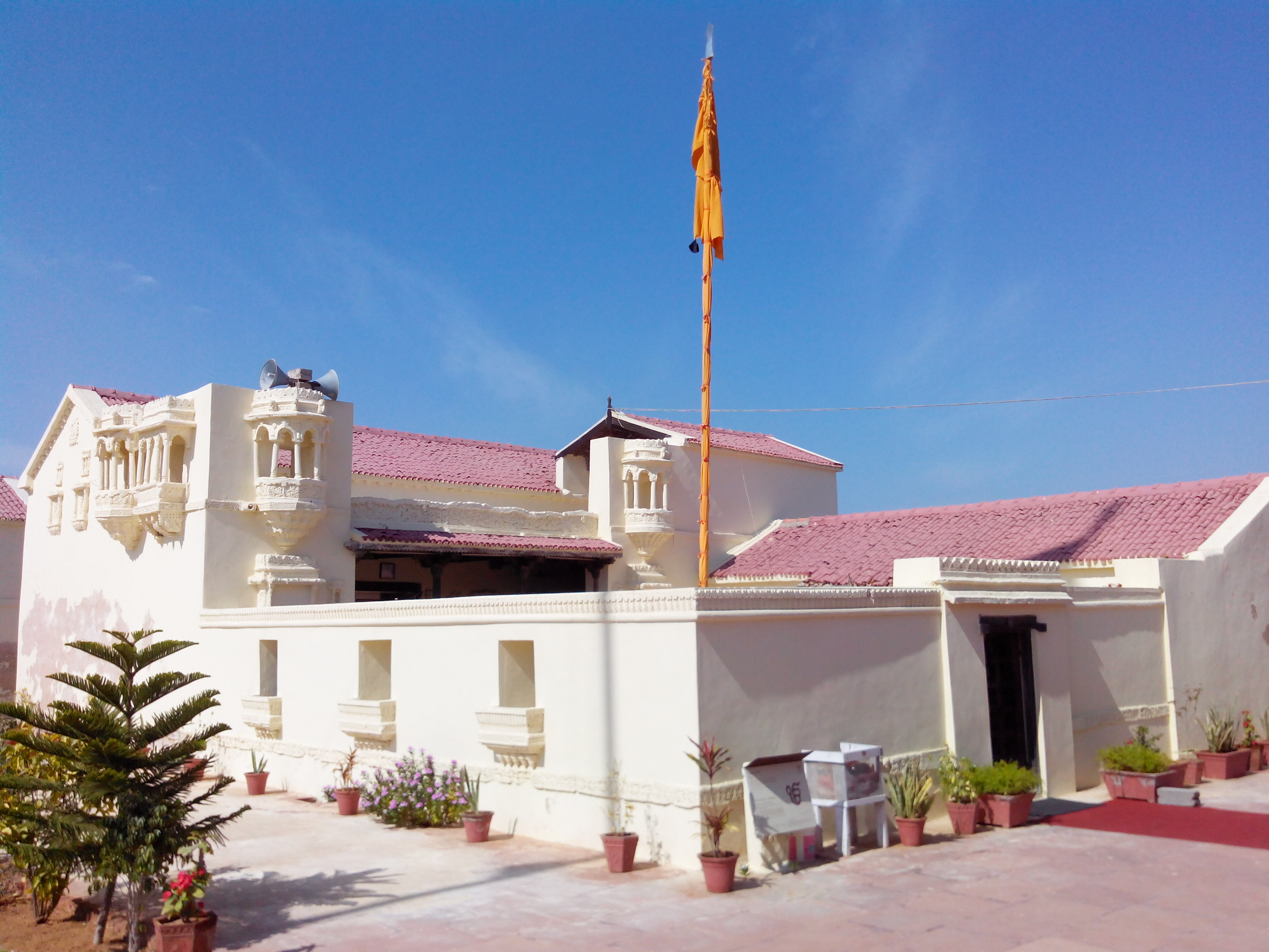 Lakhpat Gurdwara